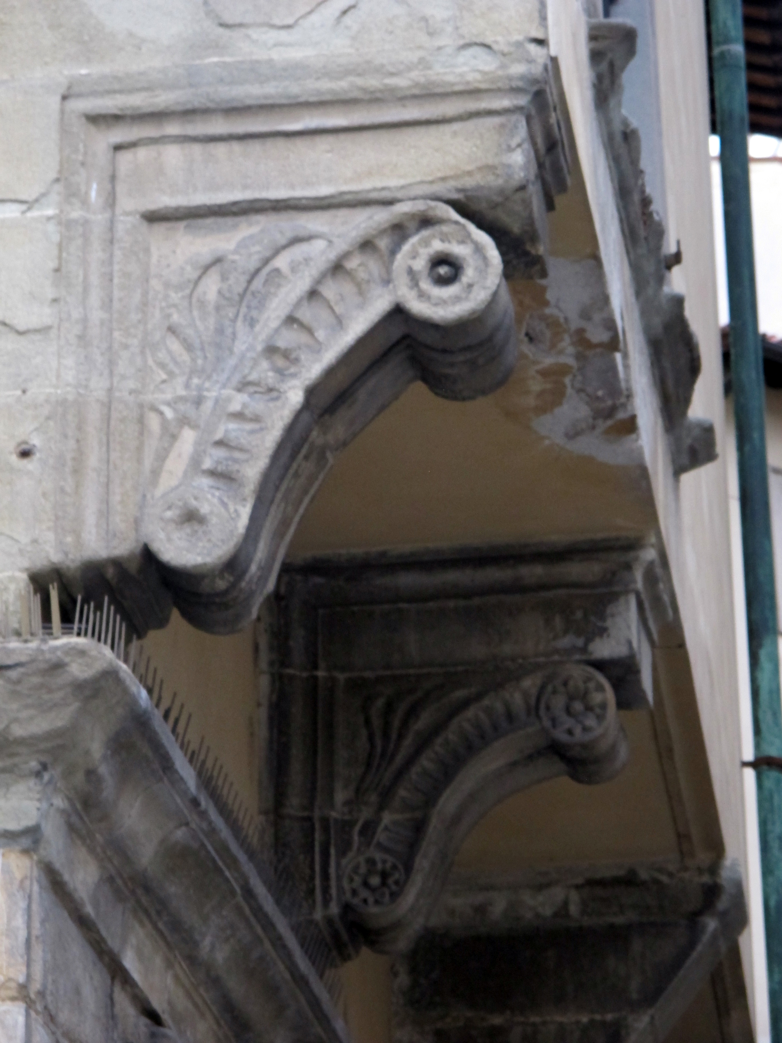 Palazzo cocchi, s. croce